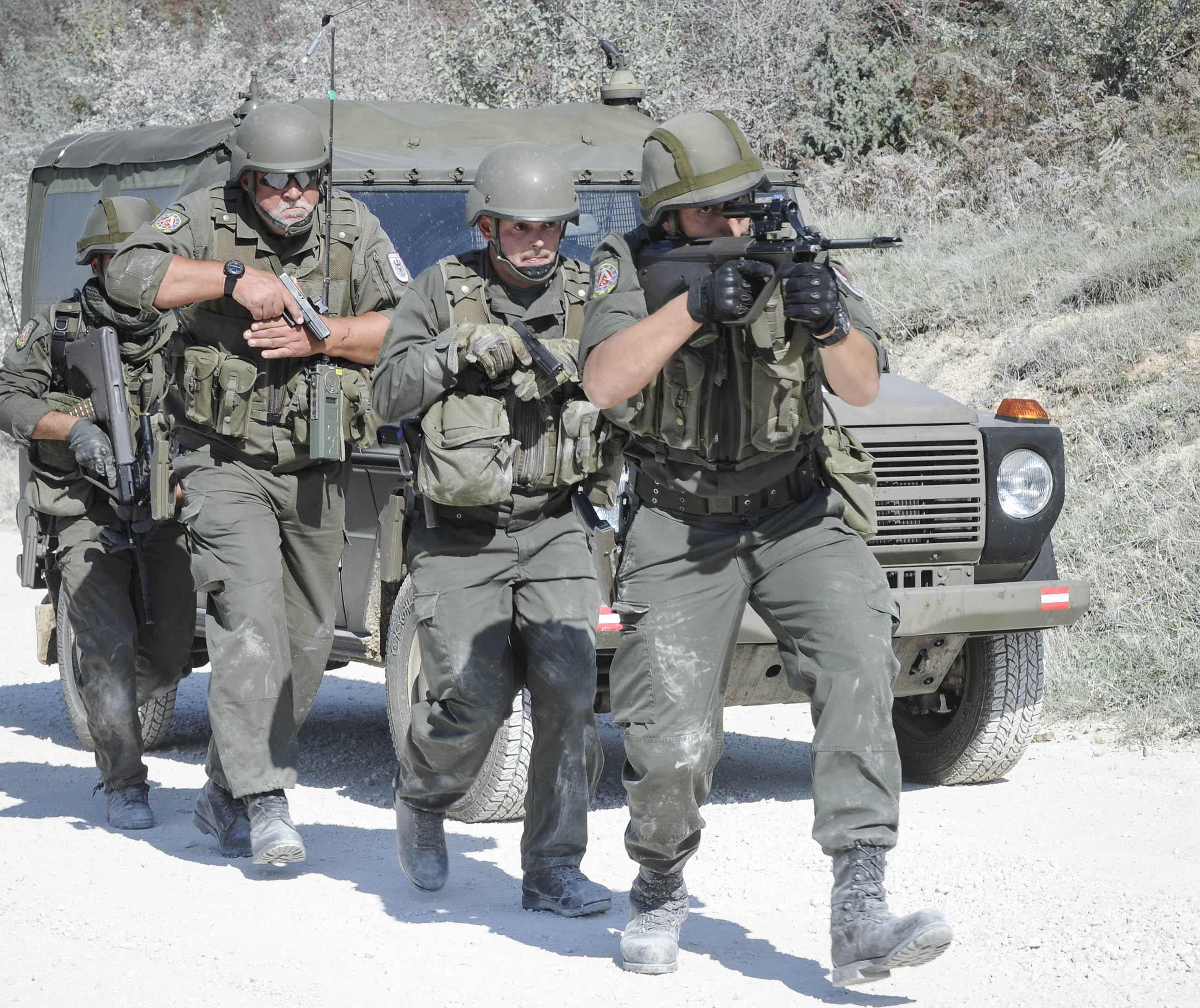 Bei der internationalen Übung "Quick Response 2016" trainieren österreichische EUFOR-Soldaten in Bosnien und Herzegowina.